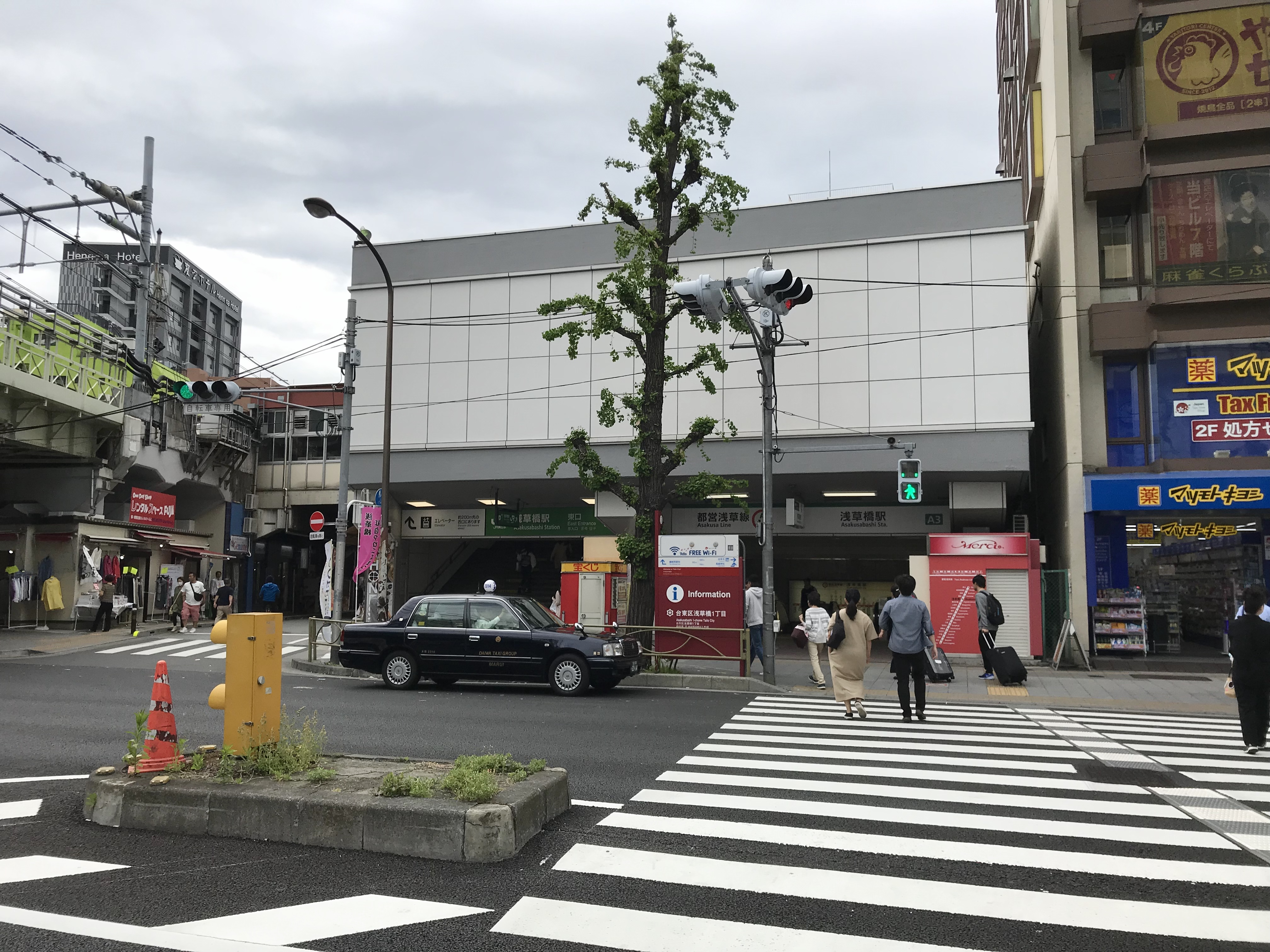 JR東日本総武線浅草橋駅・都営地下鉄浅草線浅草橋駅東口